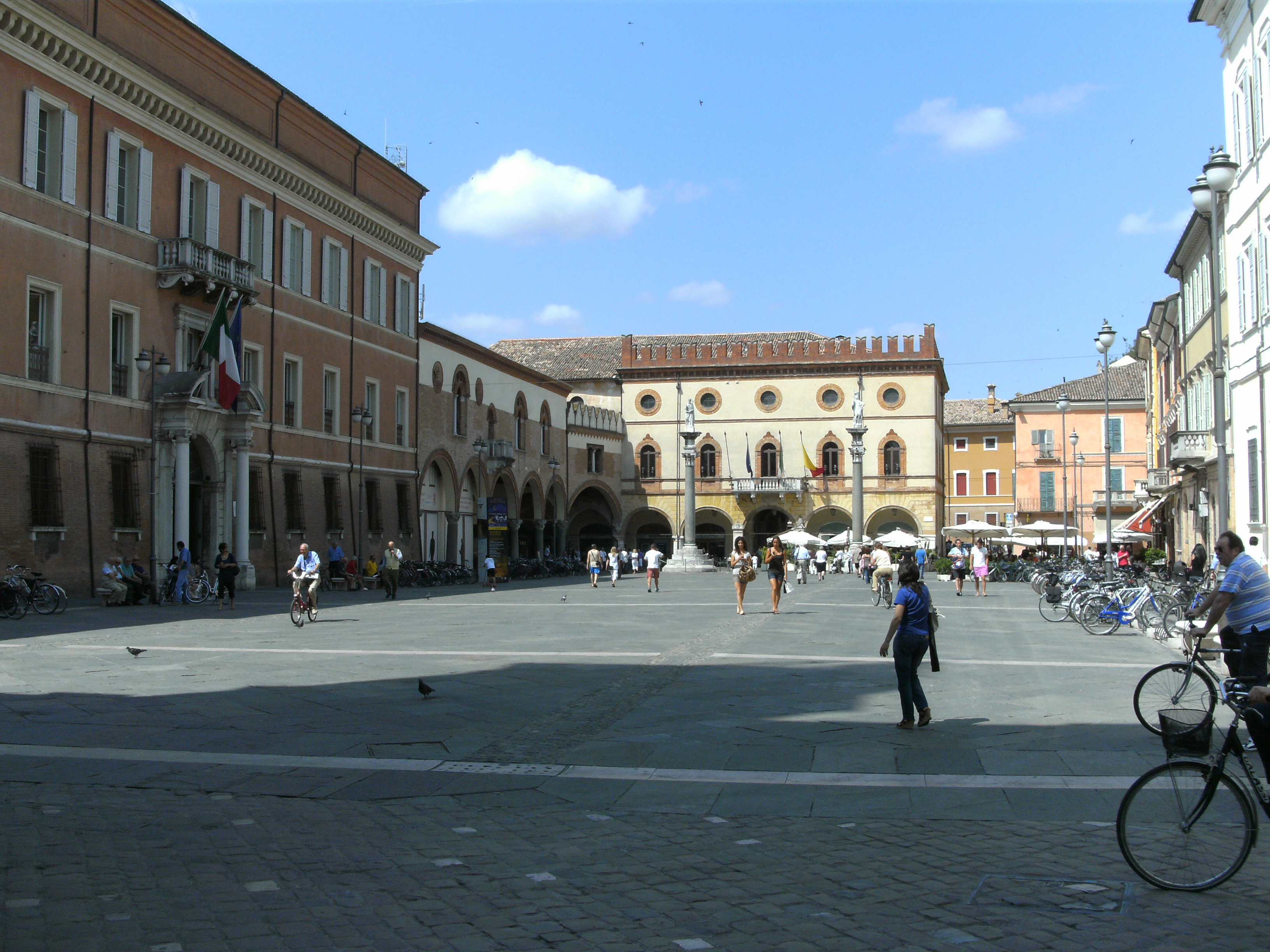 Ravenna, Zentrum: Piazza del Popolo, Westseite mit Venezianischem Palast, der Teil des Rathauses ist